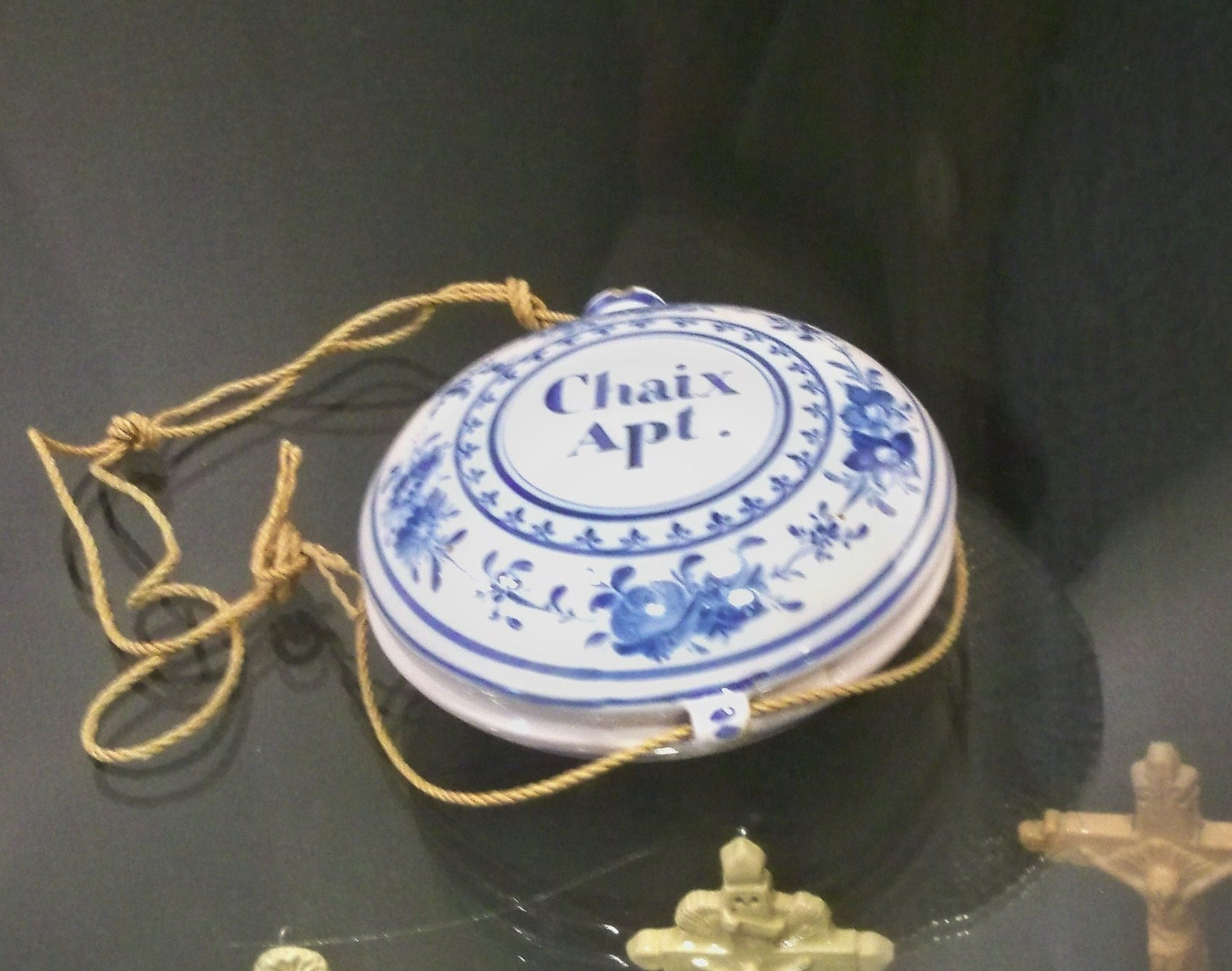 faience d'Apt (84)